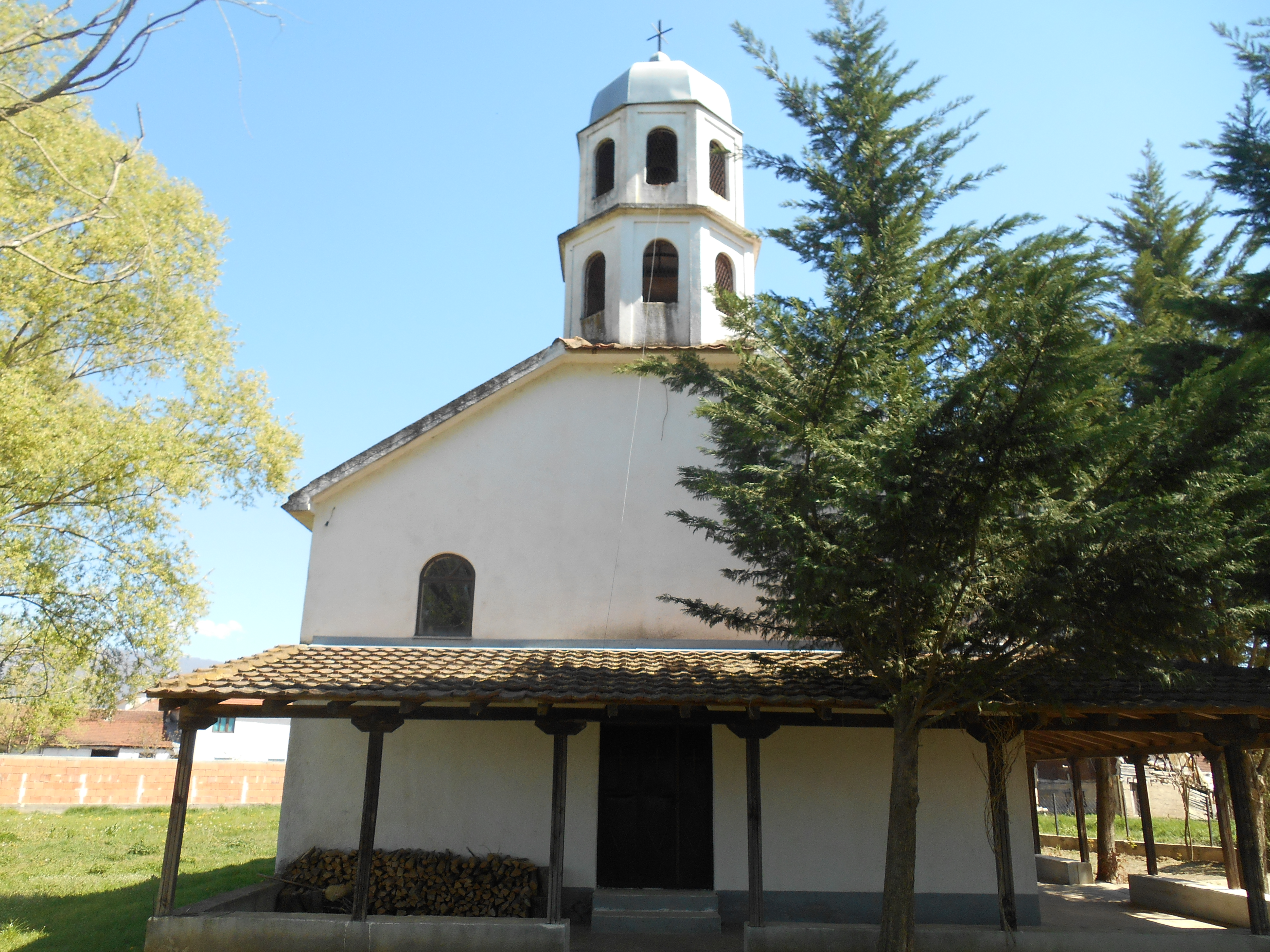 Црква во Гечерлија